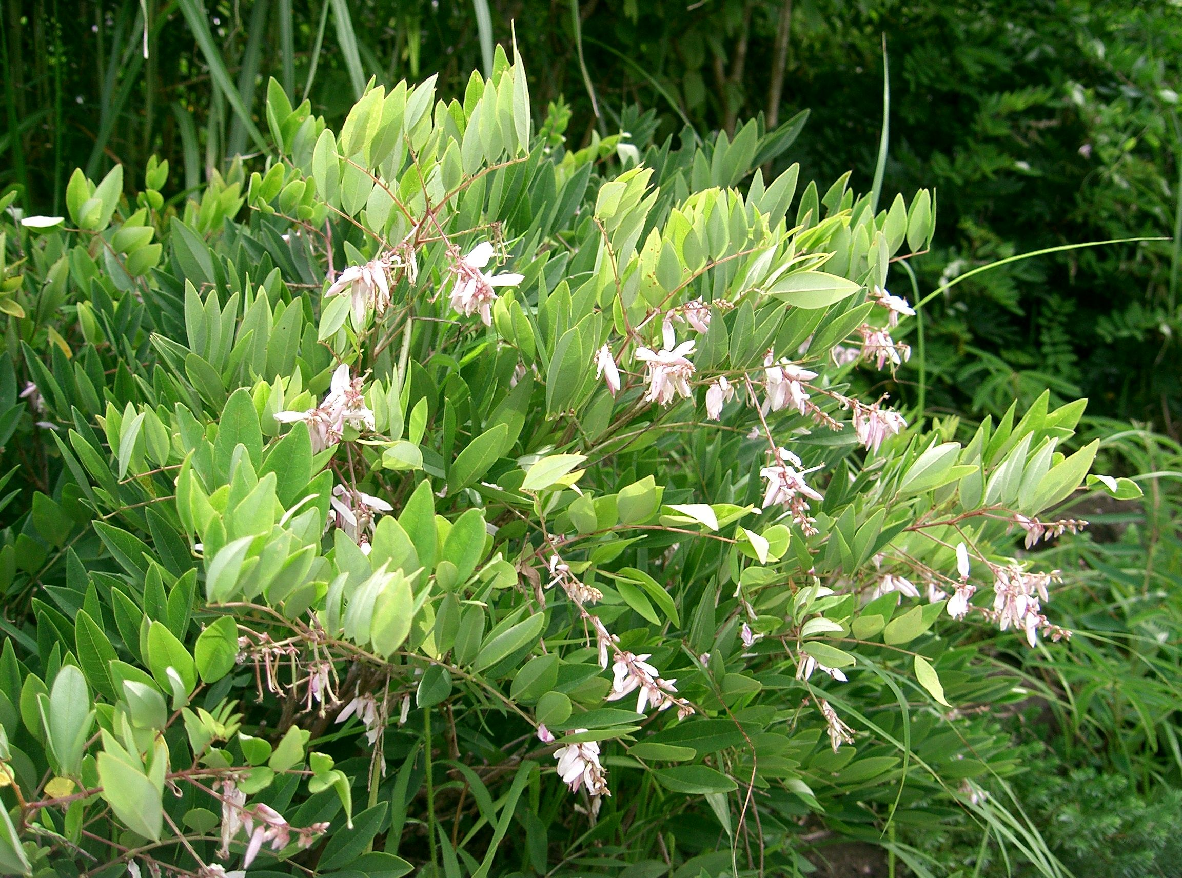 Scientific name Indigofera decora